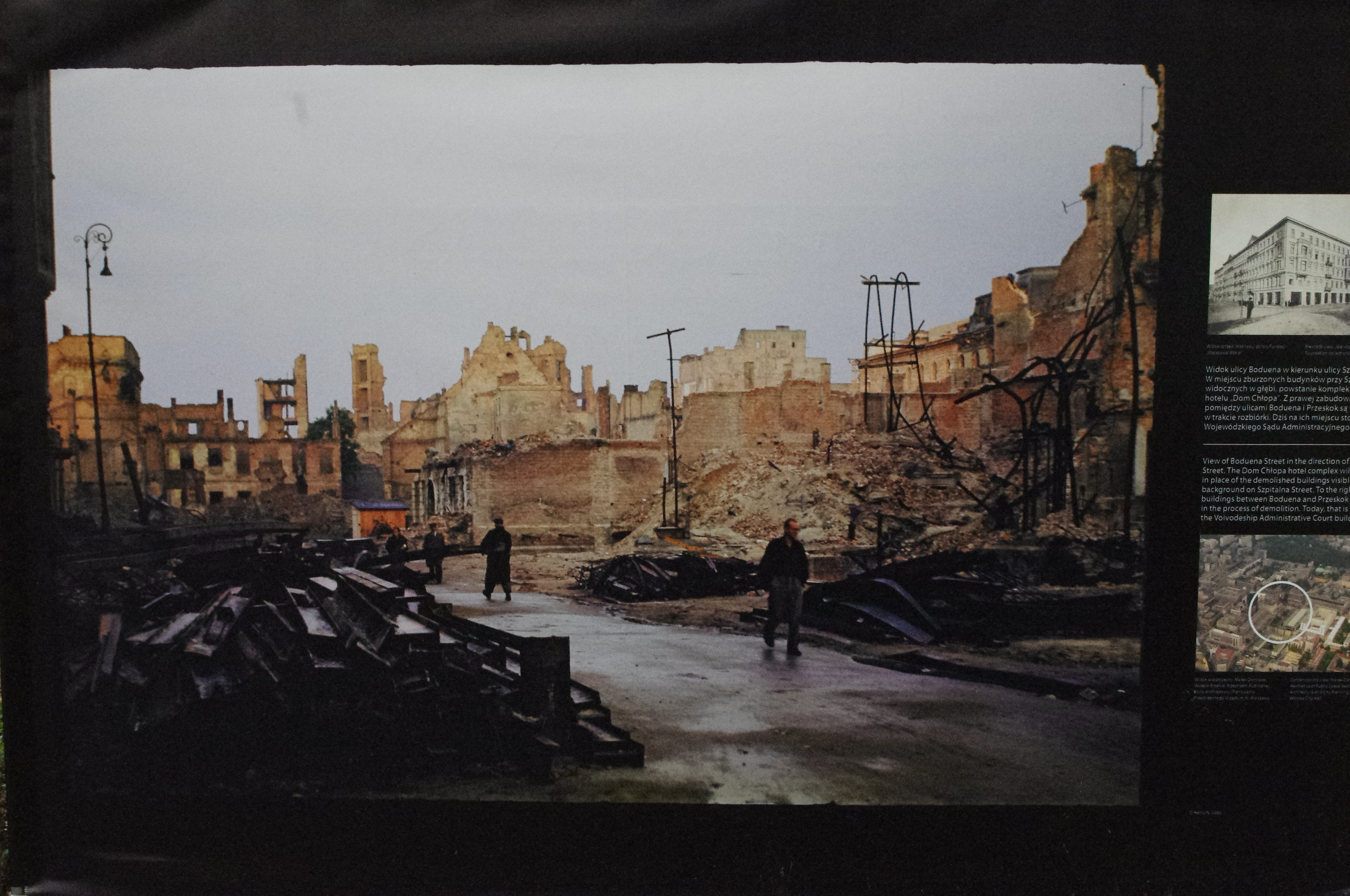 Wystawa ”Barwy Ruin” prezentowana w dniach 26 października 2012 – 5 maja 2013 plenerowo na skwerze im. ks. Jana Twardowskiego u zbiegu ul. Karowej i ul. Krakowskie Przedmieście w Warszawie. Organizatorem wystawy był Dom Spotkań z Historią (DSH), a współorganizatorami: Biuro Architektury i Planowania Przestrzennego m.st. Warszawy i Fundacja „Warszawa1939.pl”. Wystawa prezentowała kolorowe fotografie Warszawy wykonane w 1947 r., przez amerykańskiego architekta Henry'ego N. Cobba (Henry N. Cobb)